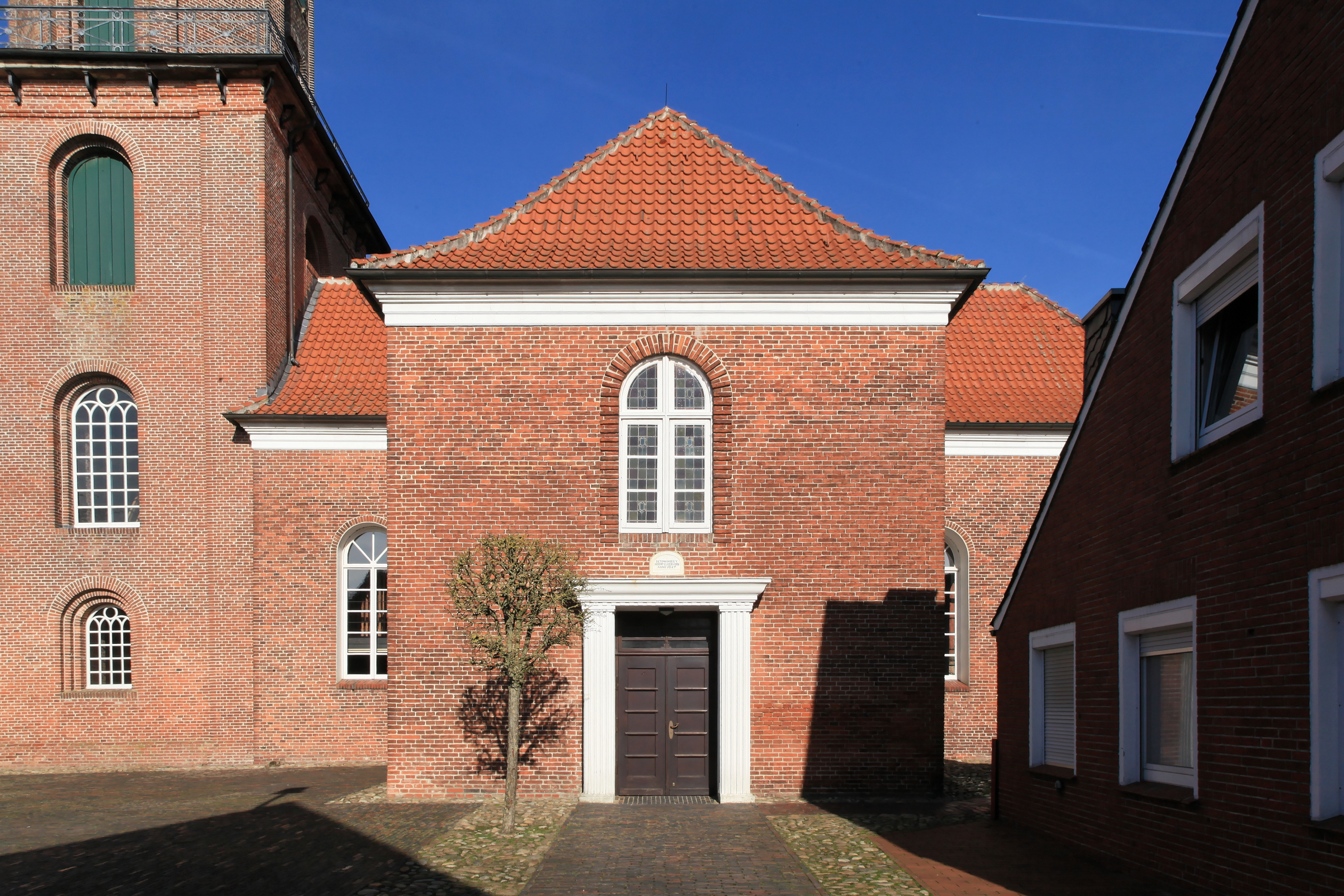 Reformierte Kirche, Lange Straße in Jemgum